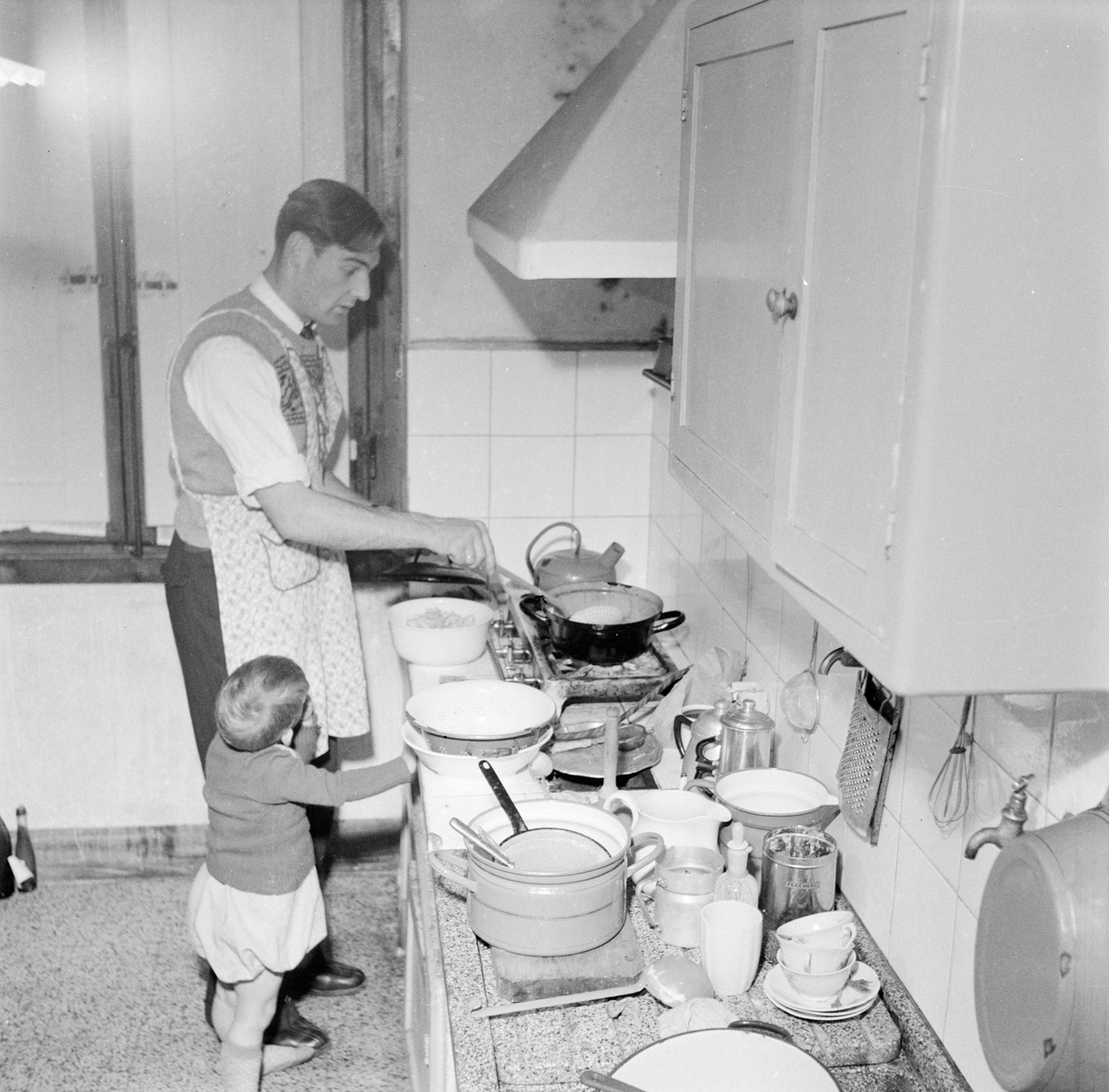 Nationaal Archief Beschrijving: Voetballer André Roosenburg in Florence. Datum: 14 april 1953 Vervaardiger: Presser Bestanddeelnummer: 905-6634 URL: [1] Voor meer informatie over het Nationaal Archief: Voor meer foto's uit deze en andere collecties, bezoek onze Beeldbank:, U kunt ons helpen onze kennis van de fotocollecties te verrijken door tags en commentaren toe te voegen. Herkent u mensen of locaties of heeft u een bijzonder verhaal te vertellen bij één van de foto's, laat dan een reactie achter (als u ingelogd bent bij Flickr) of stuur een mailtje naar